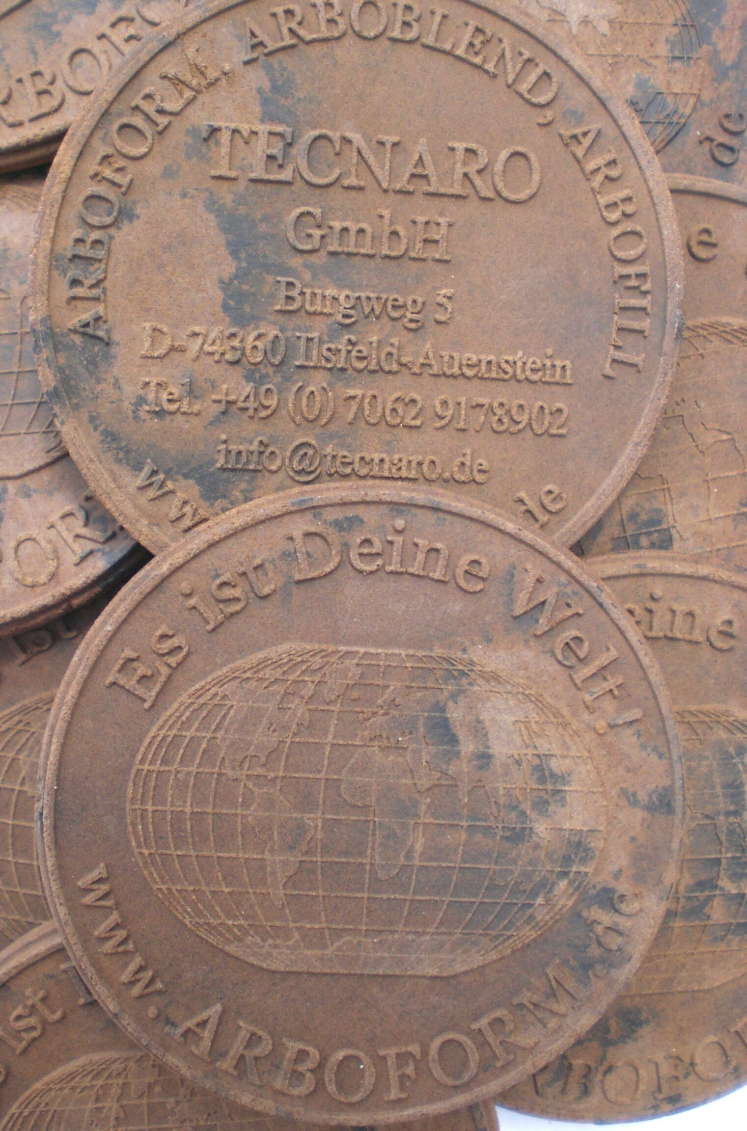 Arboform in Form von Plaketten